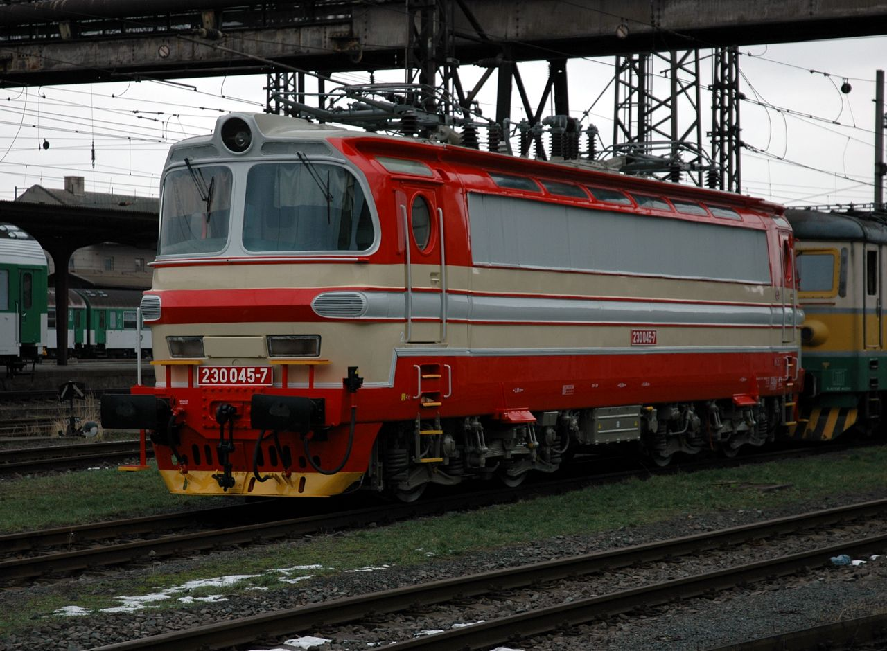 Lokomotiva 230.045 ČD v dílnách DPOV Přerov)